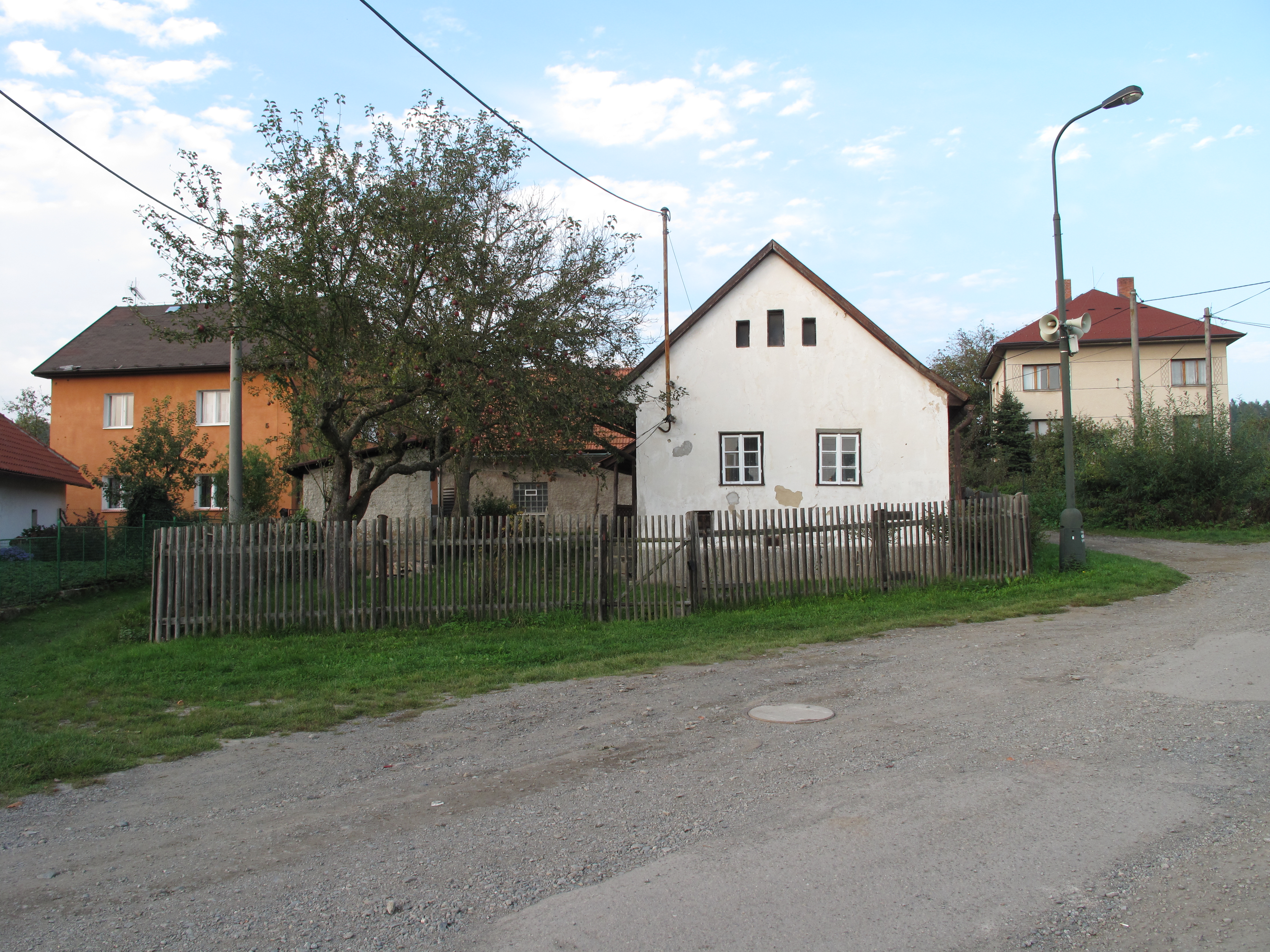 Dům s předzahrádkou v Kovářovicích. Okres Benešov, Česká republika.